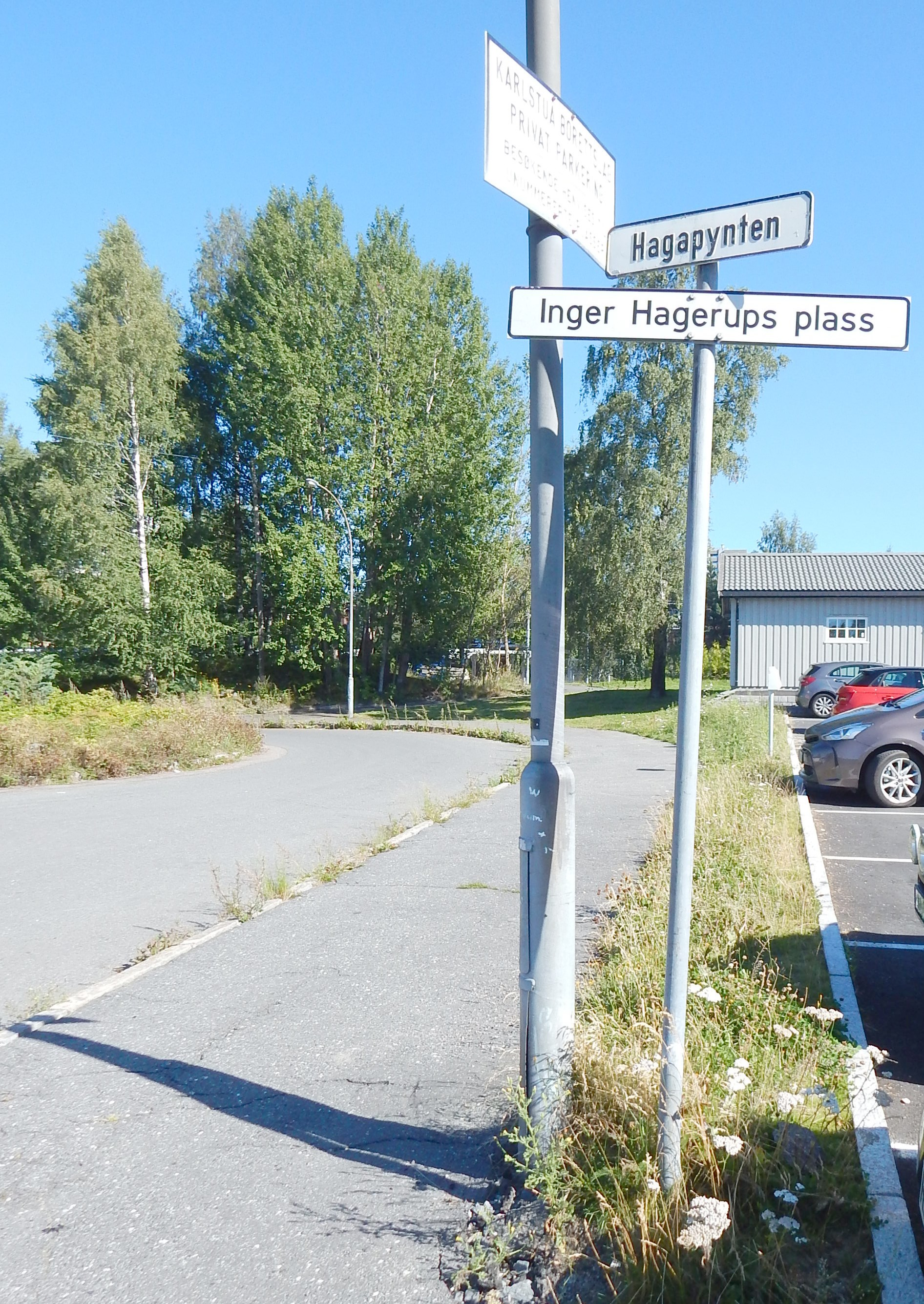 Inger Hagerups plass